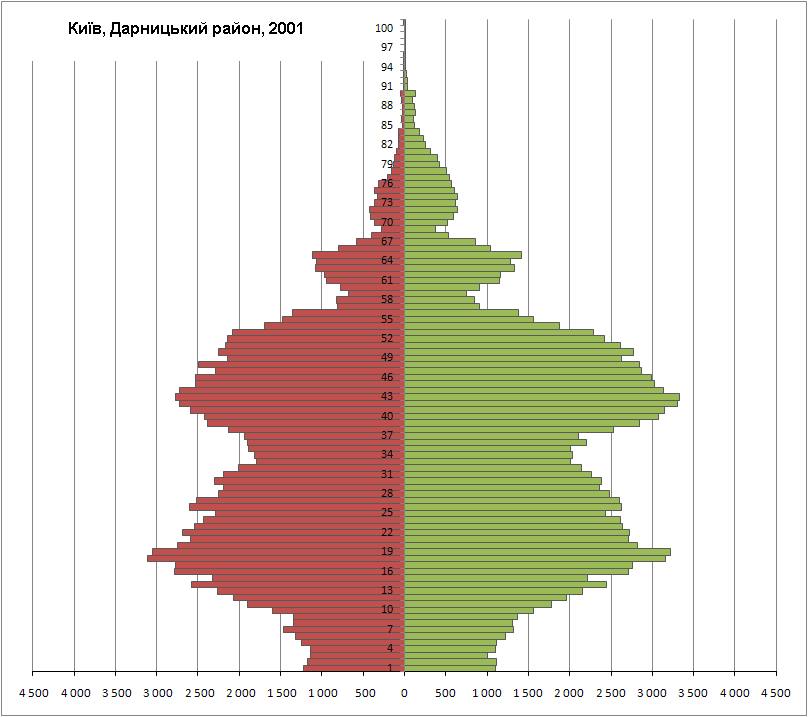 Статево-вікова піраміда населення Святошинського району Києва за переписом 2001 р.